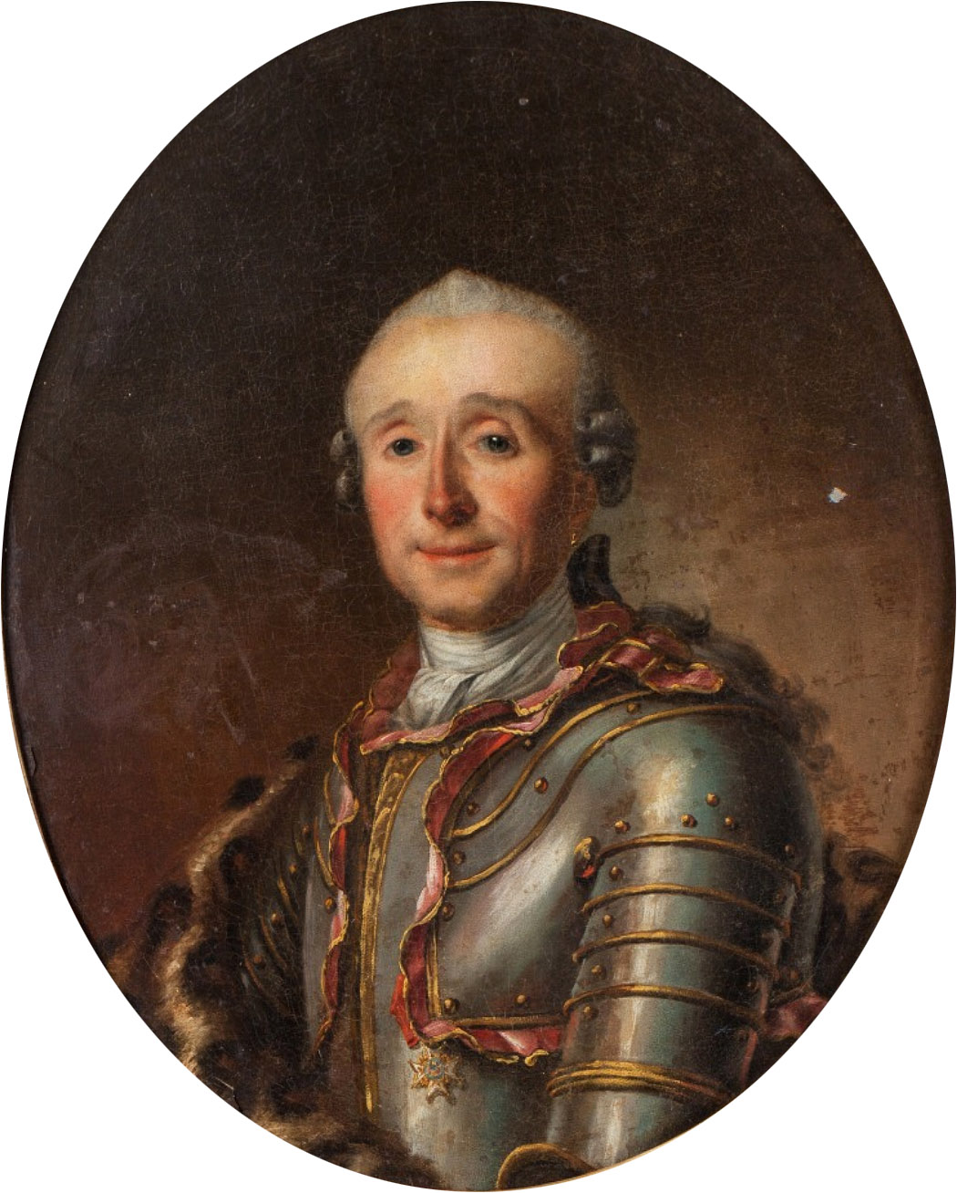 Jules Hercule Mériadec de Rohan, Prince de Guéméné, Duc de Montbazon, Pair de France, 1776